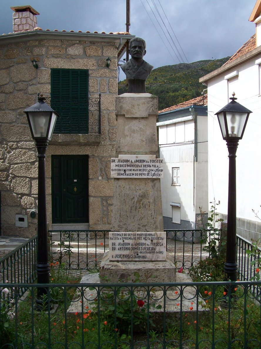 Busto de homagem Dr. Joaquim A Amorim da Fonseca